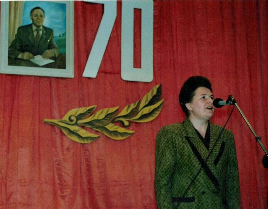 Выступление на юбилейном вечере Я. Хамматова Г. Ситдыковой